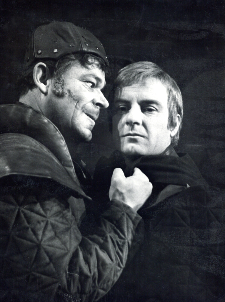 Matej Bor, Ples smeti, Mestno gledališče ljubljansko. Na fotografiji: Janez Škof (Lorenzo), Zlatko Šugman (Van Valden).